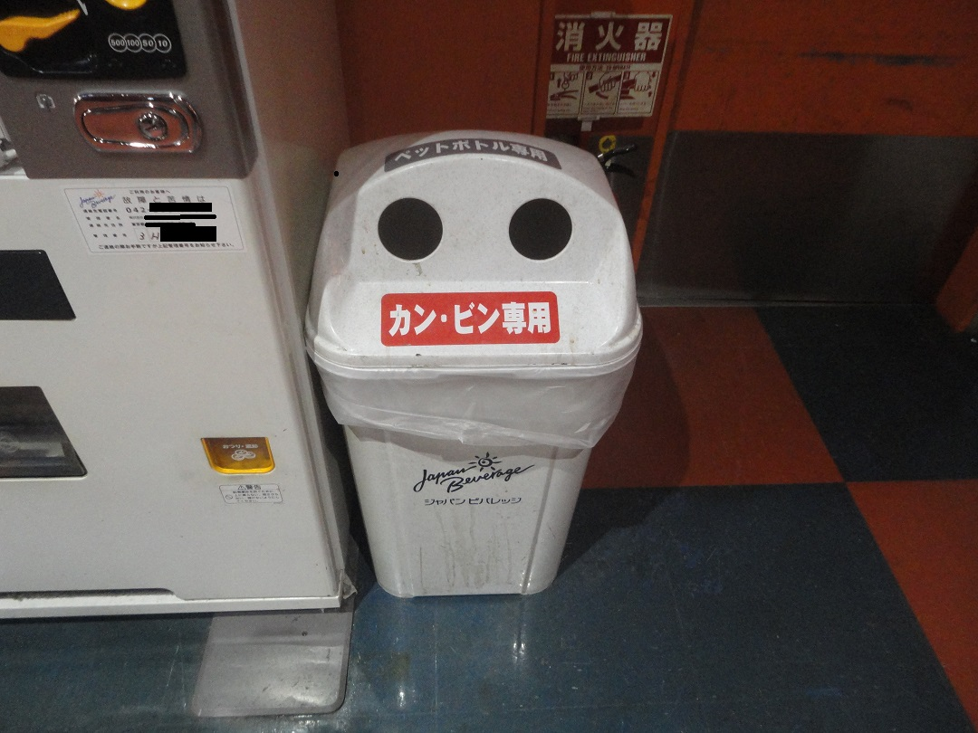 缶・ビン・ペットボトル分別用のゴミ箱。